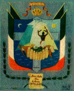 Escudo del municipio de Yanga, estado de Veracruz.